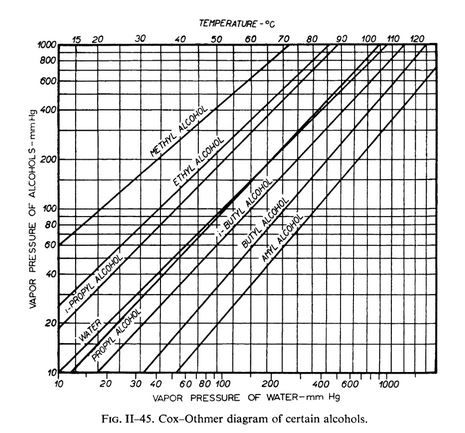 Diagramme de Cox-Othmer pour divers alcools. Logarithmes naturels des pressions de vapeur saturante de divers alcools en fonction du logarithme naturel de la pression de vapeur saturante de l'eau à la même température.